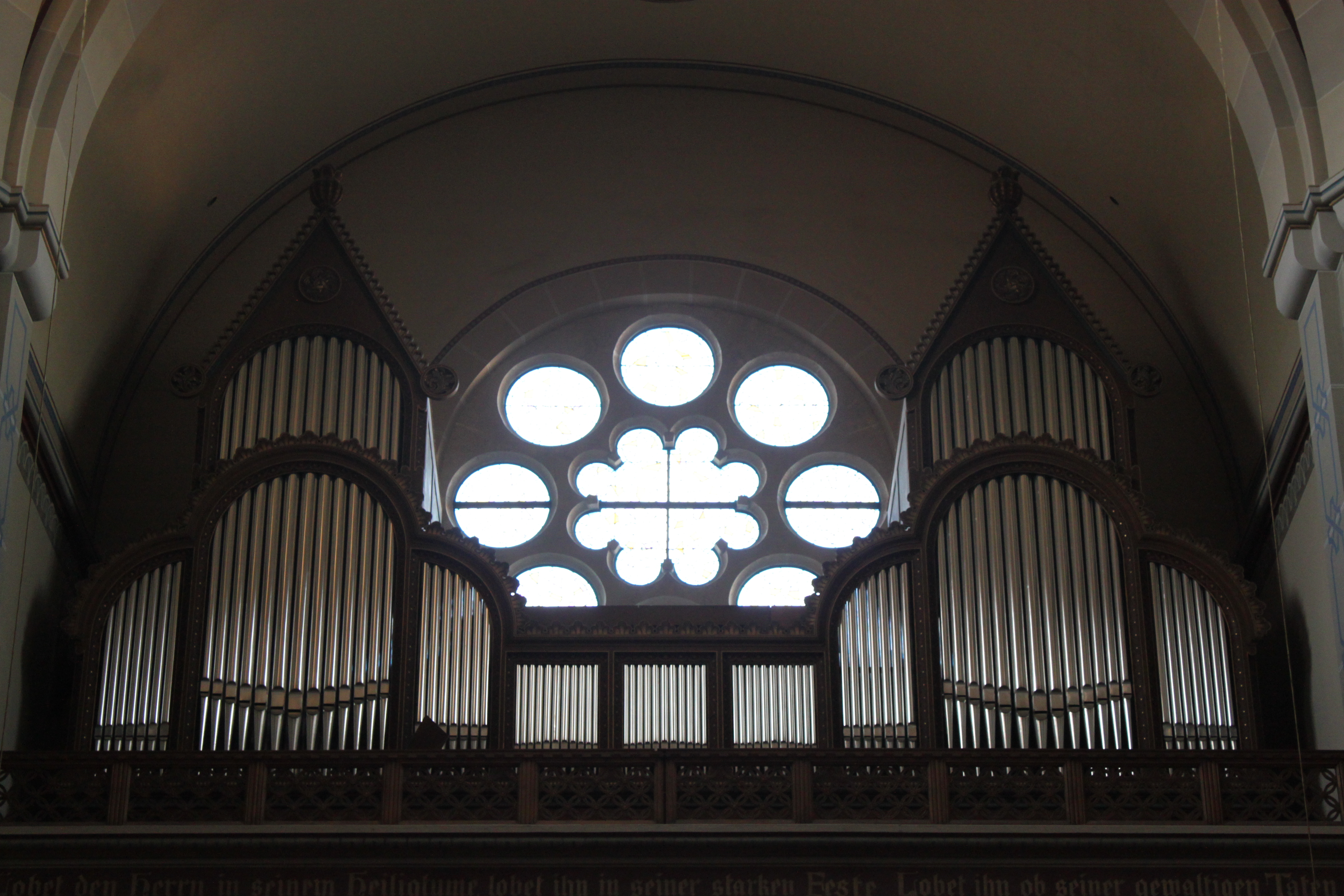 Rieger-Orgel der Karmelitenkirche, Silbergasse 35, Wien-Döbling